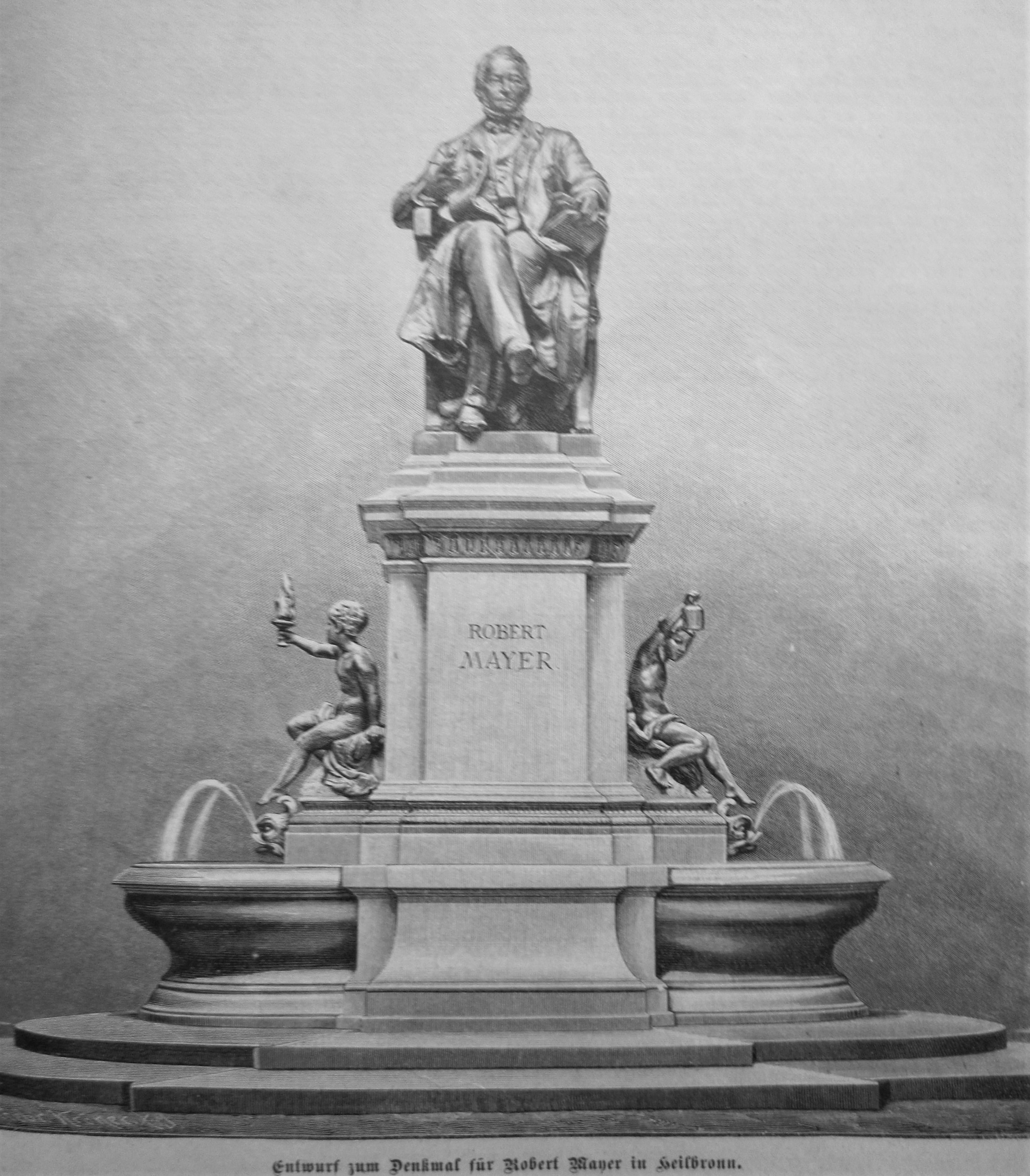 Entwurf zum Denkmal von Robert Mayer in Heilbronn, Ausführung: Wilhelm von Rümann, München. Holzstich, aus Gartenlaube 1891